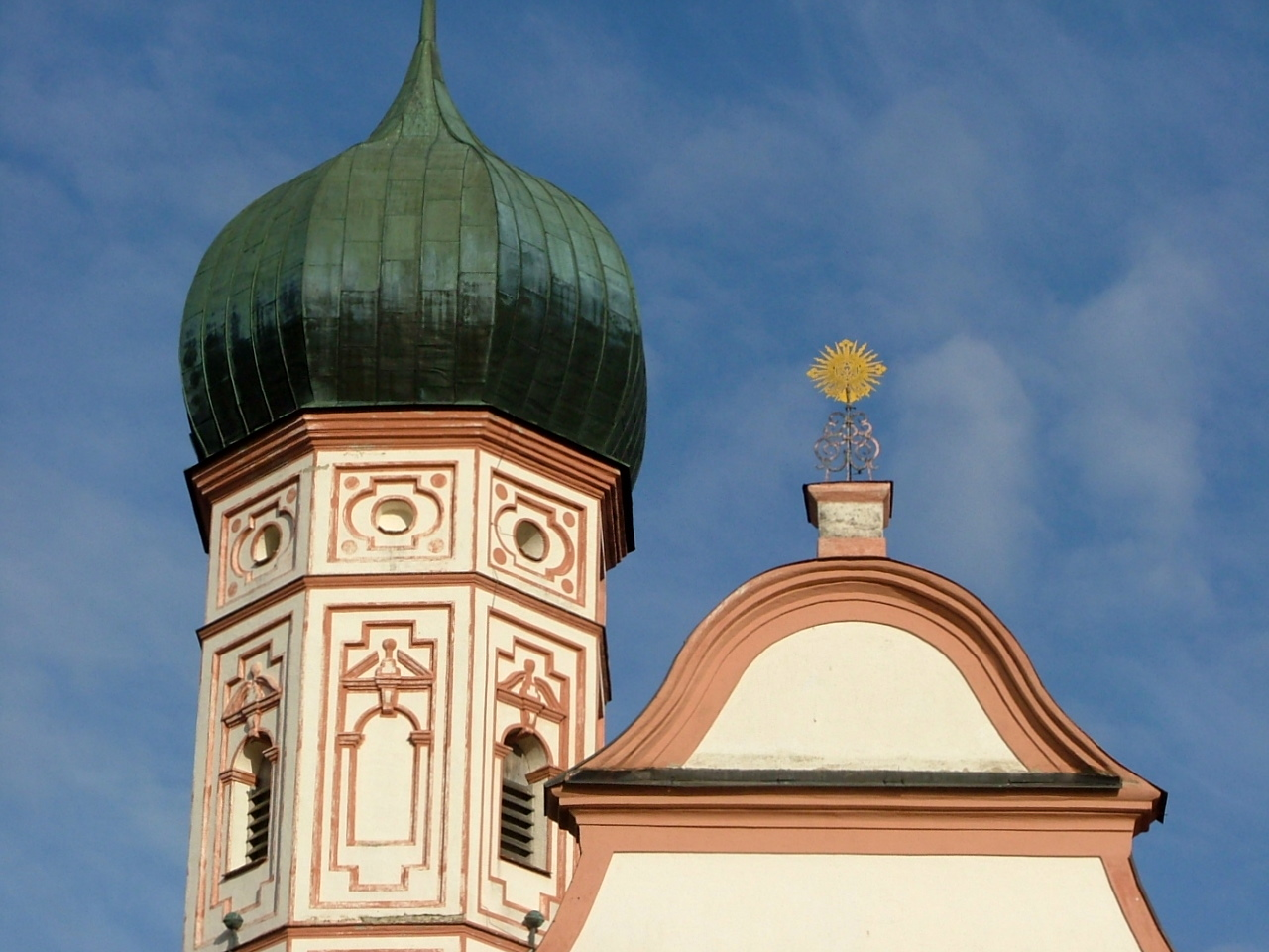 Oberostendorf